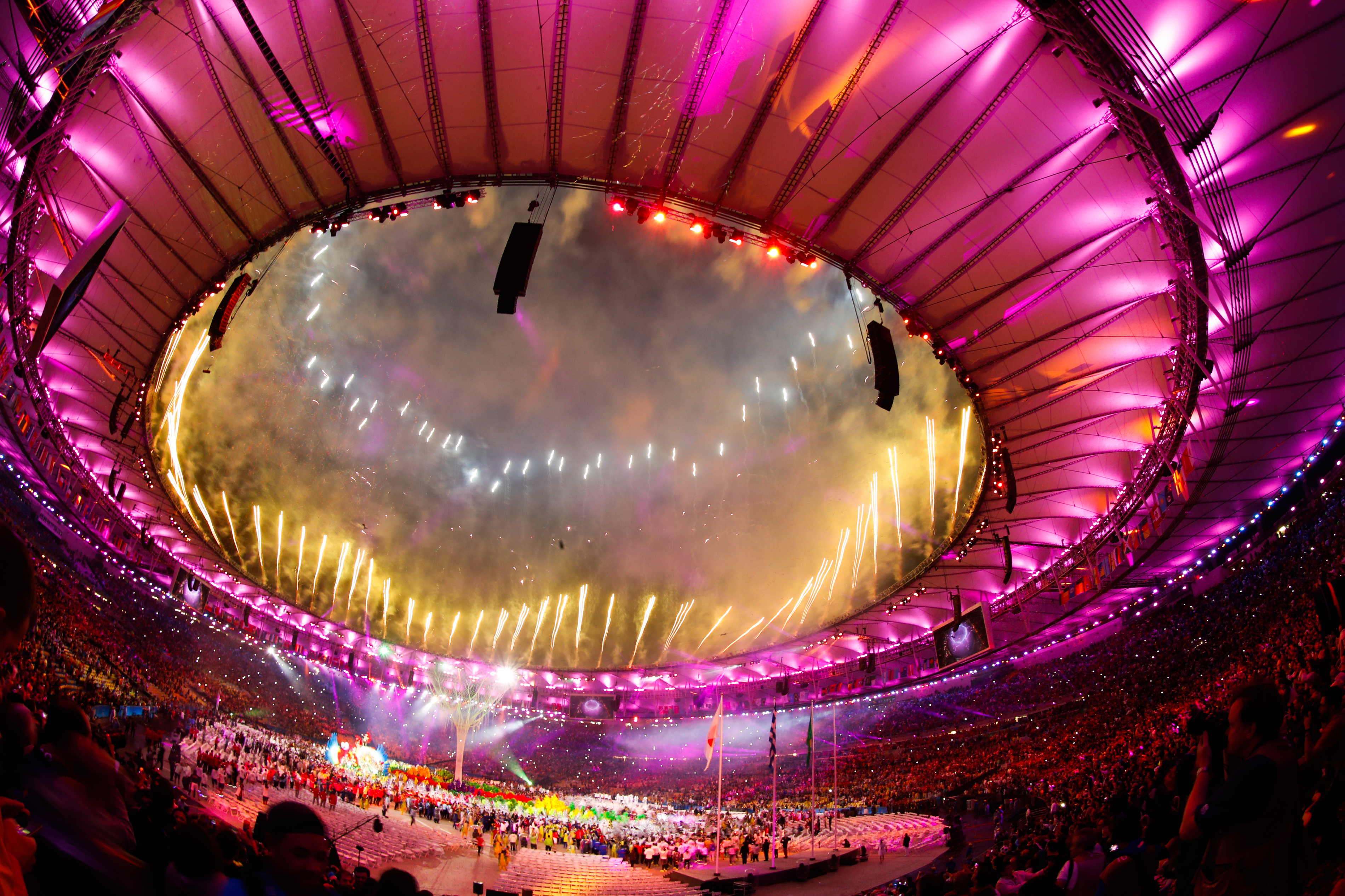 Rio de Janeiro - Cerimônia de encerramento dos Jogos Olímpicos Rio 2016, no Maracanã ( Fernando Frazão/Agência Brasil)